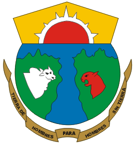 Bandera del departament colombià de Vichada